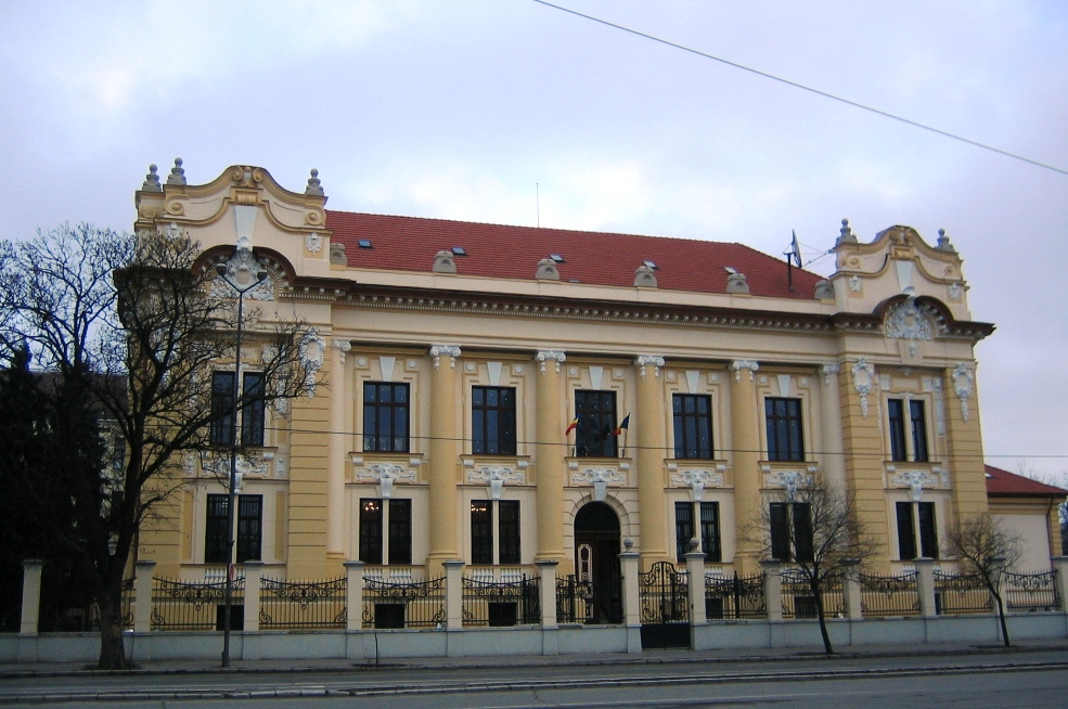 Sediul BNR (Banca Nationala) Timişoara.